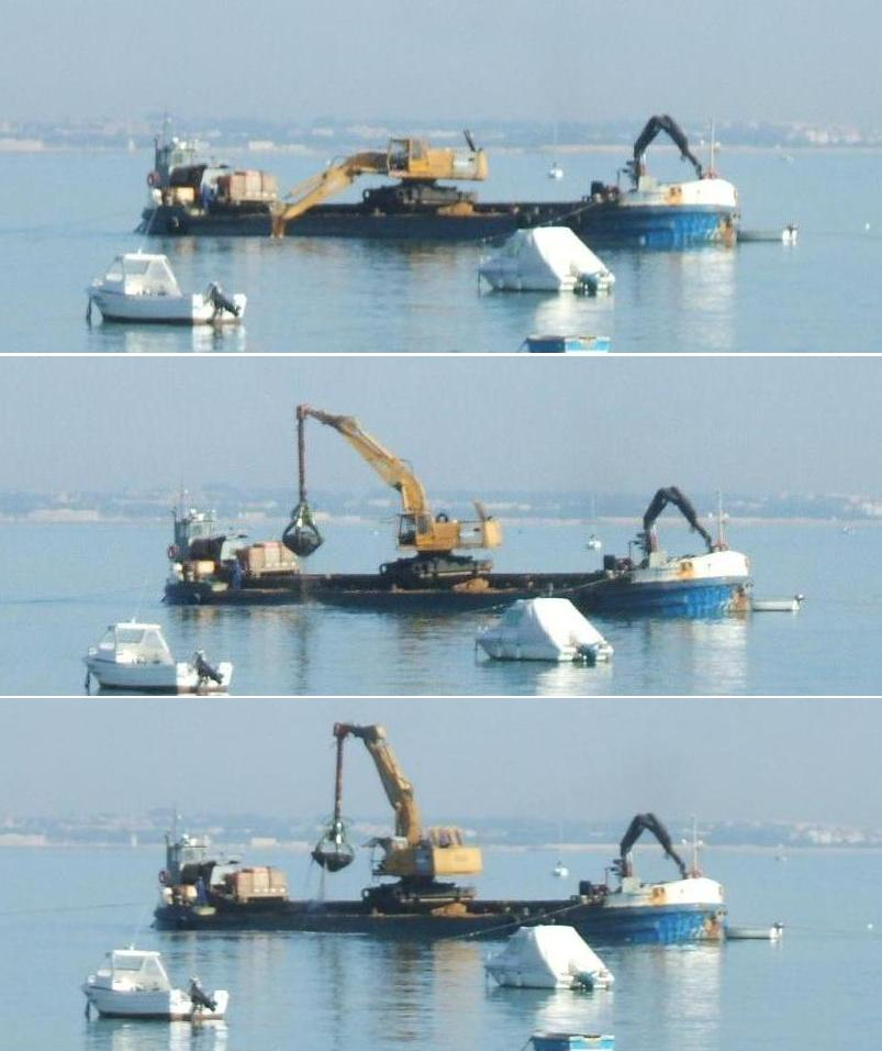 En Cádiz hay un barco que trabaja todo el año dragando el puerto en la Bahía.